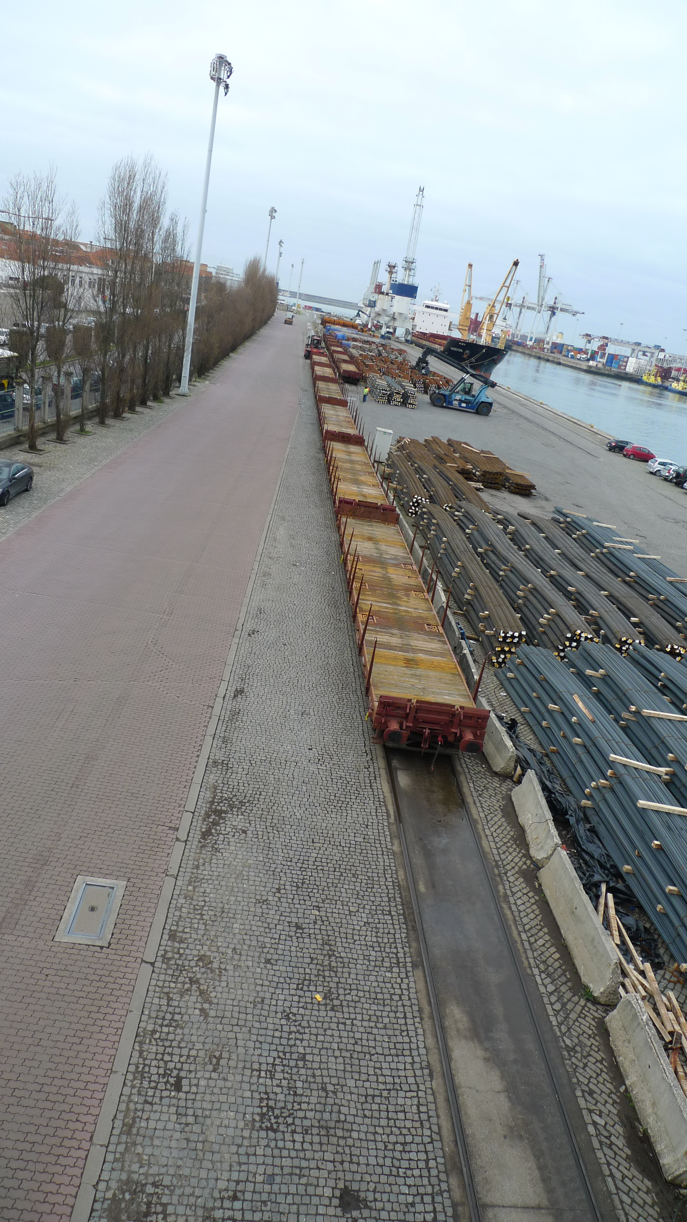 L1180958